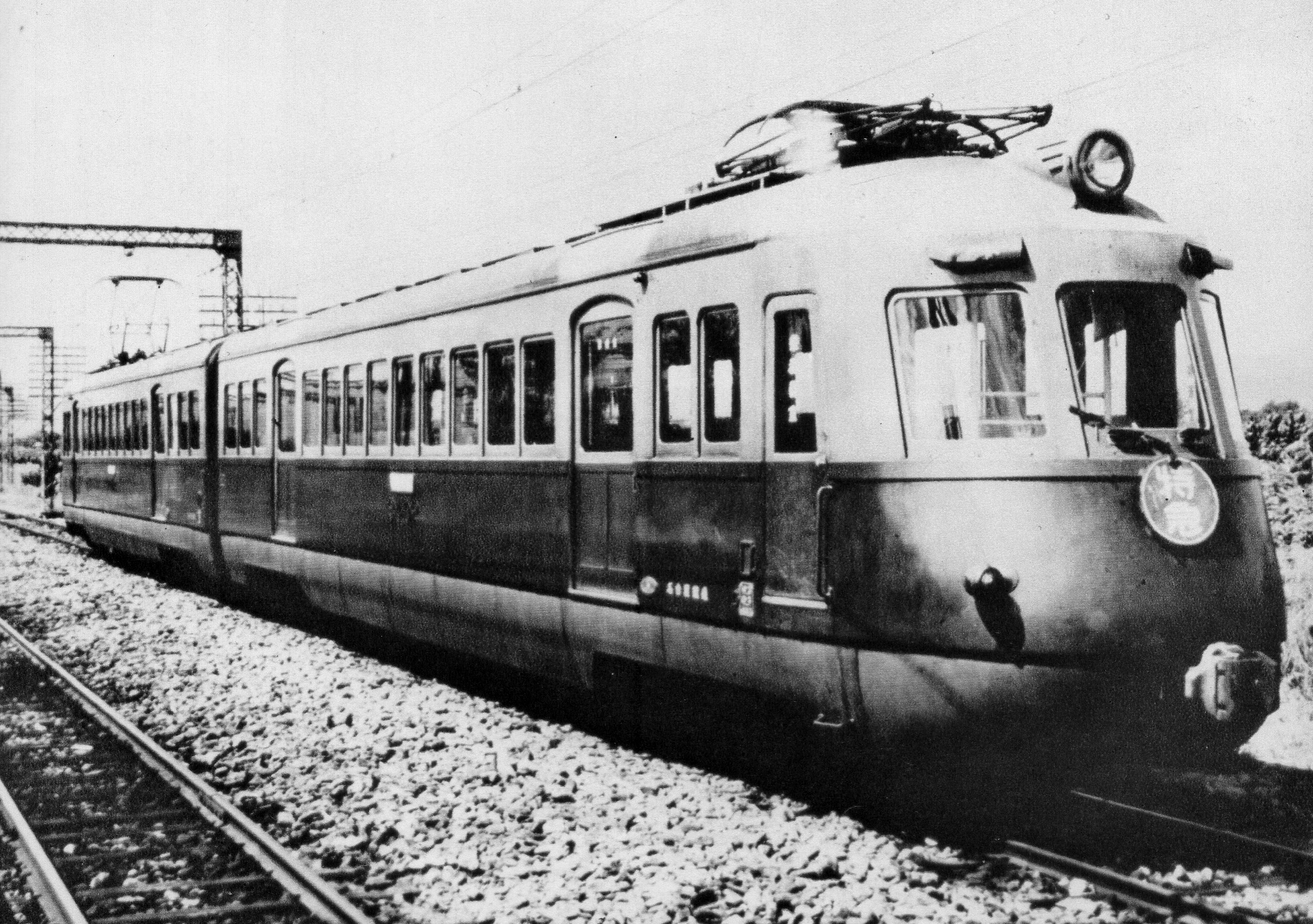 名鉄3400形。2両編成かつク2400形にパンタグラフがあることから1941年頃の改装前の写真。